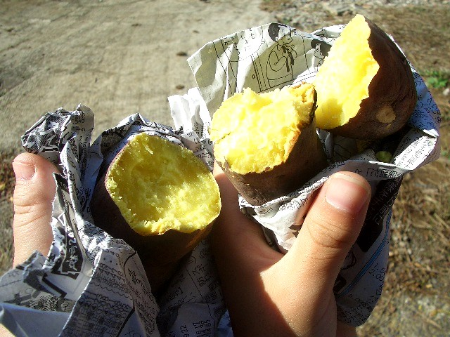 芋ほりの後で...